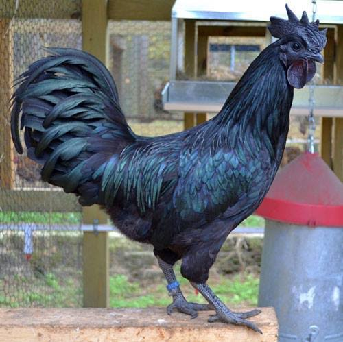 ஒரு வயதாகும் கருங்கோழி எனப்படும் கடக்நாத் சேவல். (ஆண் கோழி)